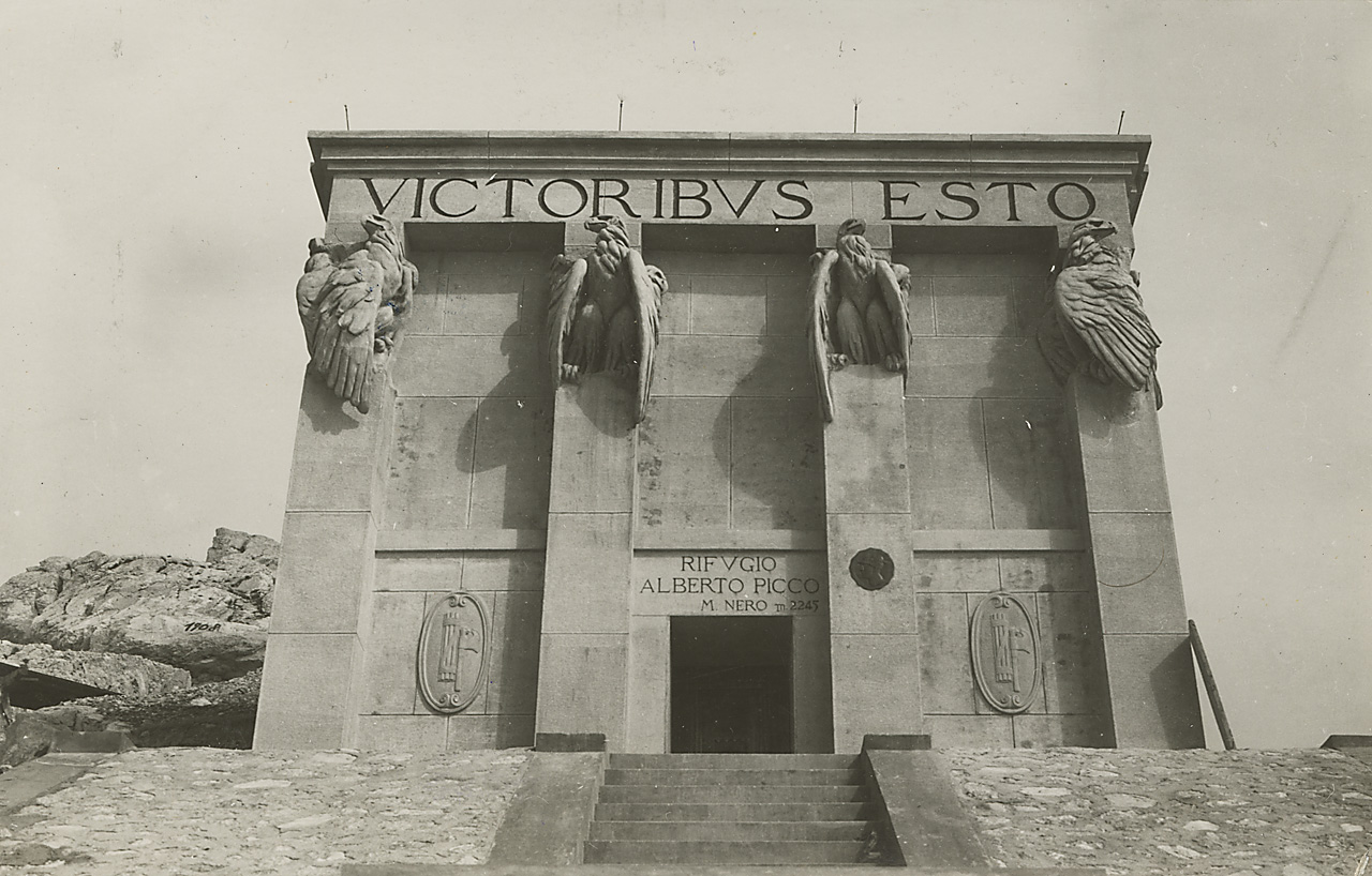 Monumento rifugio Alberto Picco a Valvasone Udine M. Nero m.2245